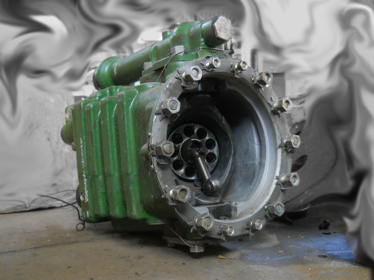 Корпус аксиально-поршневой гидромашины привода металлорежущего станка.